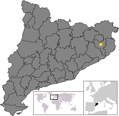 Localització de Girona. Location of Girona in Catalonia.